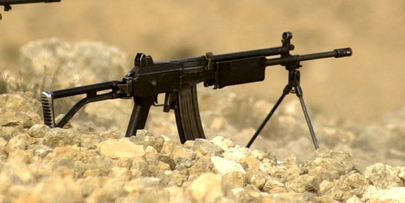 IMI Galil.